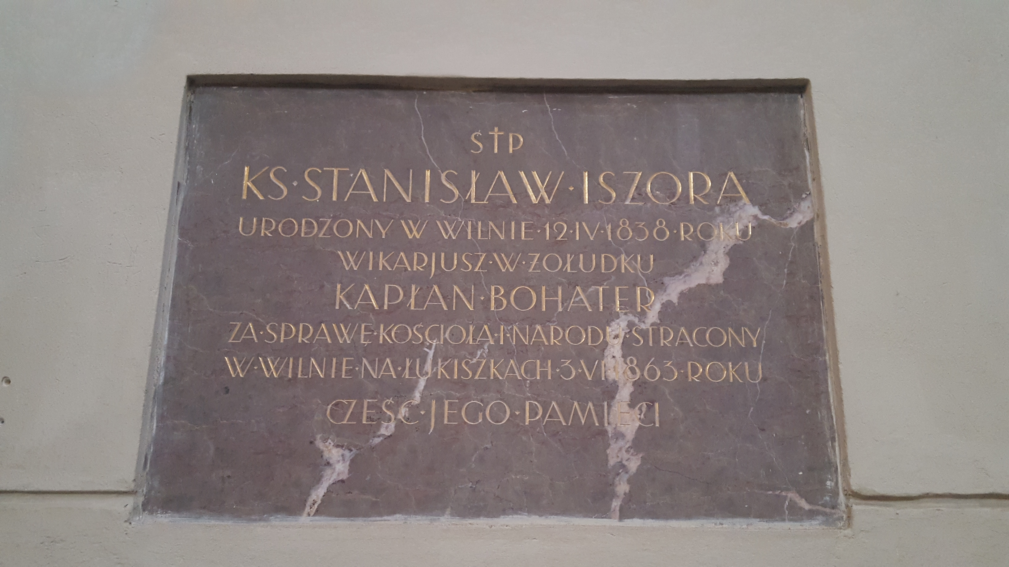 Tablica pamiątkowa ku czci księdza wikariusza Stanisława Iszory straconego przez Rosjan w czasie powstania styczniowego w 1863 roku.